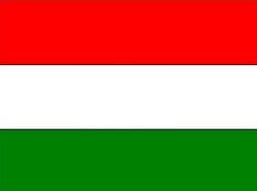 bandera del municipio de Puerto Tejada, Colombia